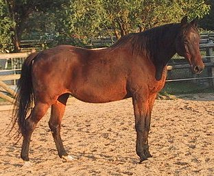 30 jährige Anglo-Kabardiner Stute, selbst gemachtes Bild